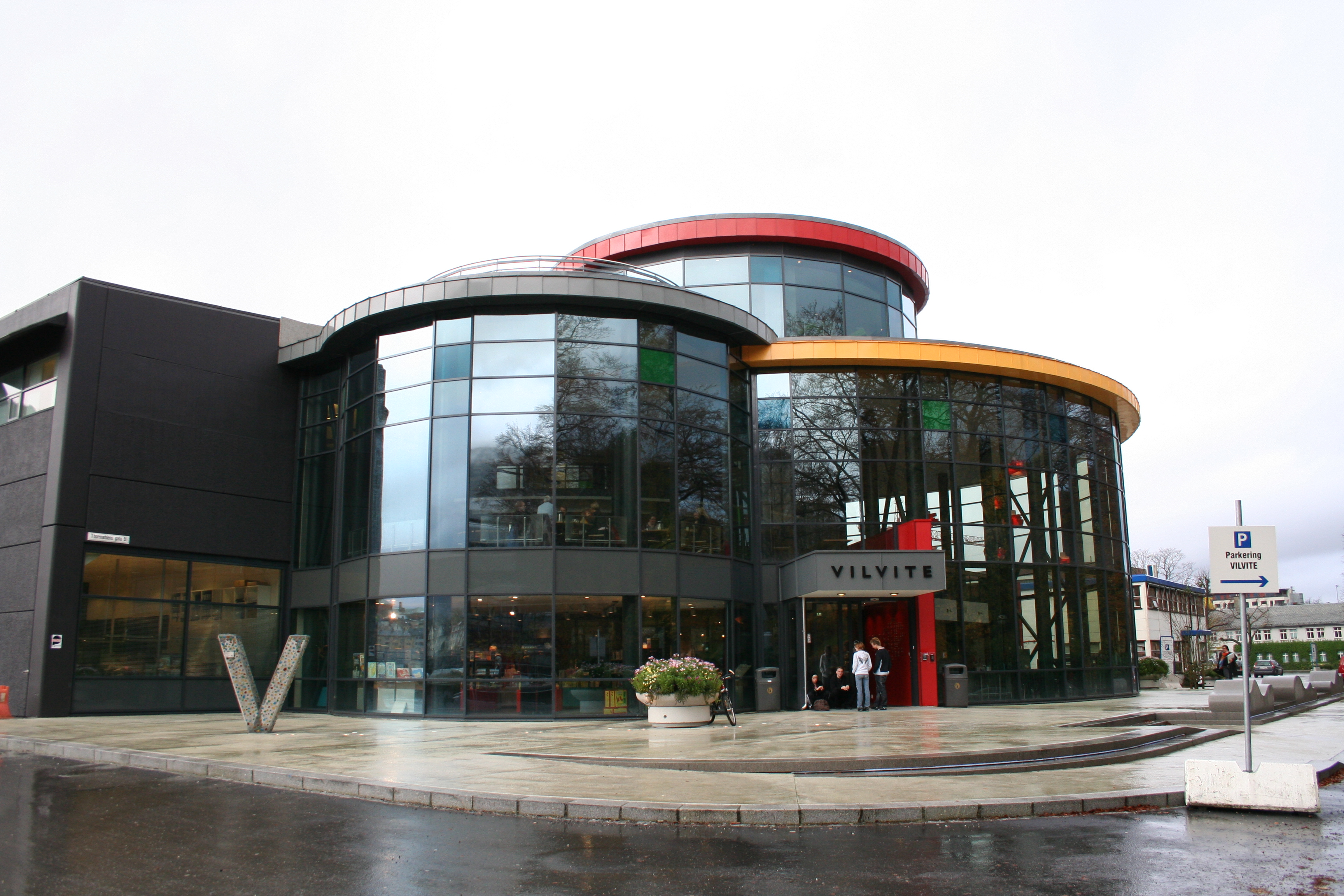 VilVite - Bergen Science Cenre